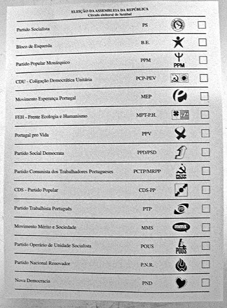 Elections ballot, Portugal. 2009-09-10.